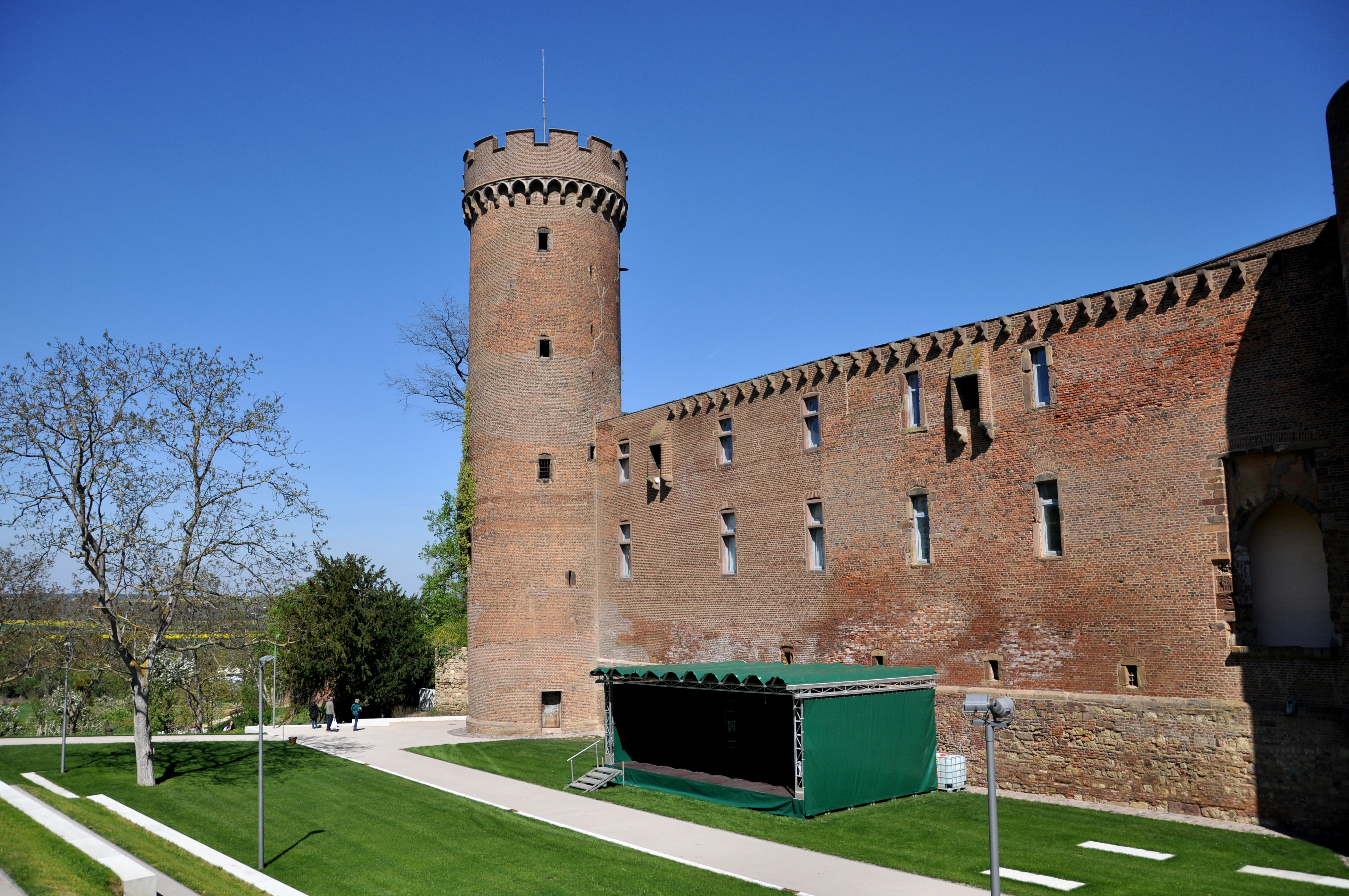 Landesgartenschau Zülpich 2014, Impressionen vom Eröffnungstag 16. April 2014